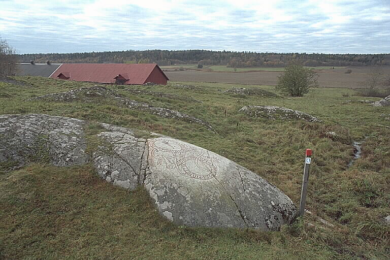 RAÄ-nummer Uppsala 337:1. Inskriften lyder: Ale (eller Alle) och Jovurfast lät göra minnesmärket efter Jarl, sin fader , och efter Gisl och efter Ingemund. Han blev dräpt österut, Jarls son. Öpir ristade.